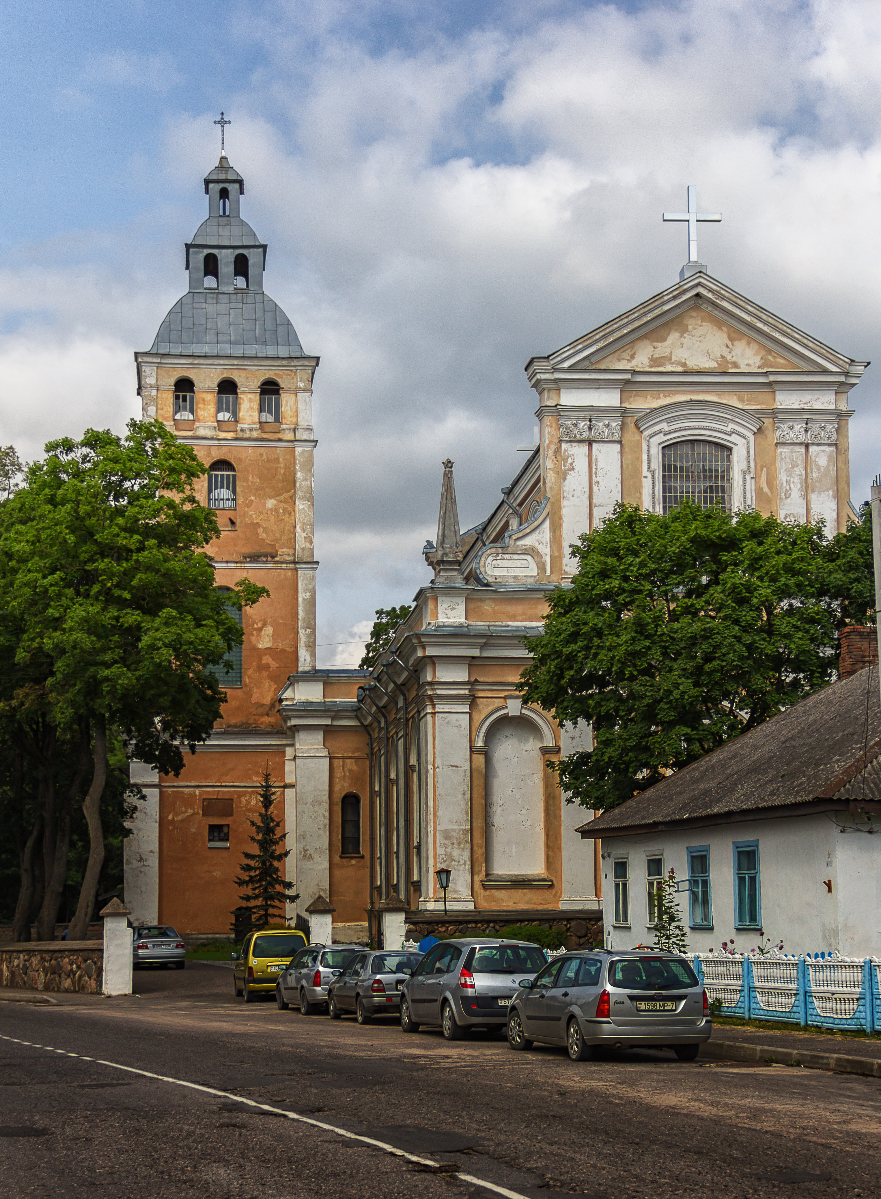 Беларуская (тарашкевіца): Мікалаеўскі касьцёл (1649—1653, перестроен в 1909). г.п. Сьвір